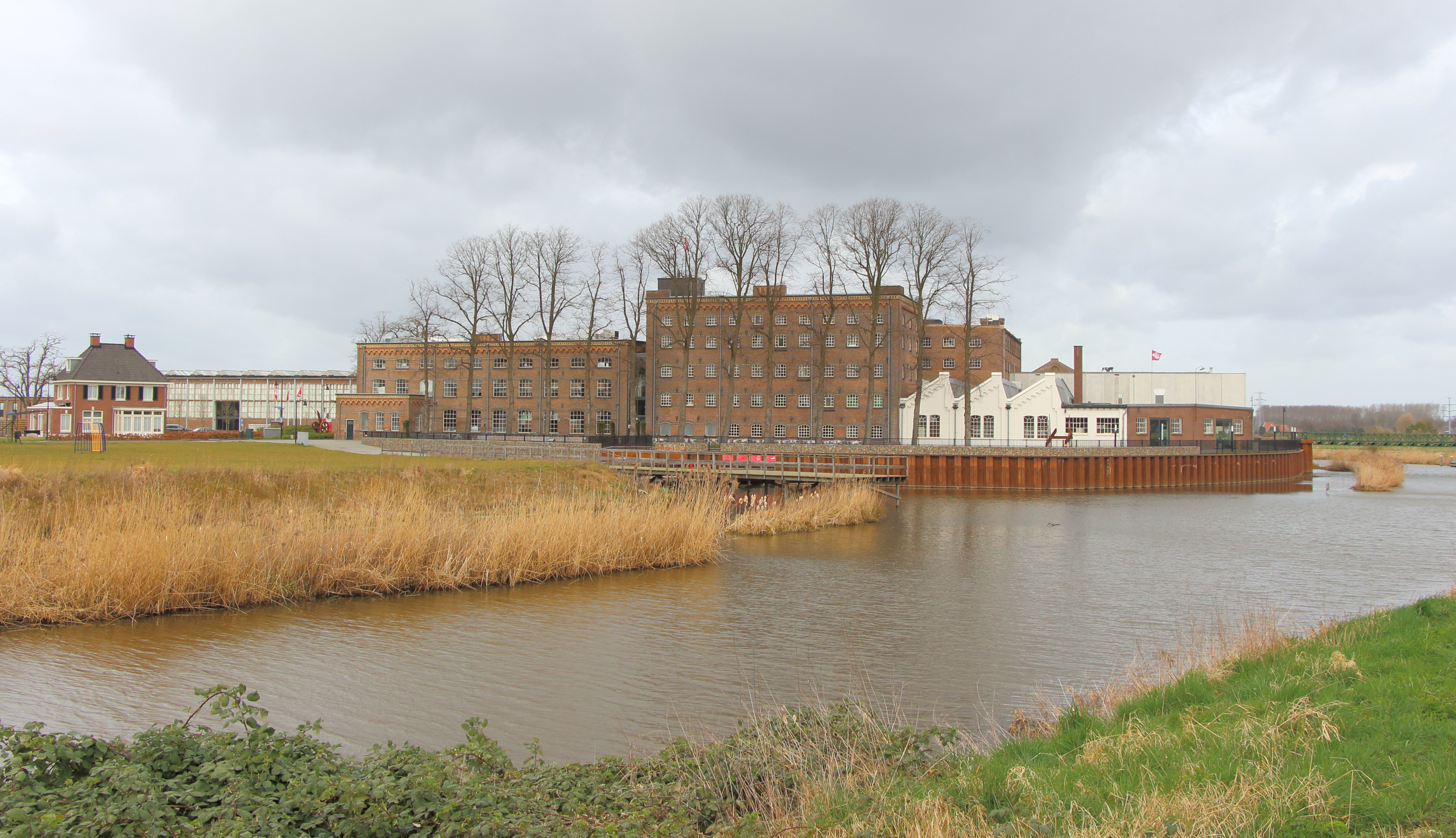 DRU-complex, Ulft.